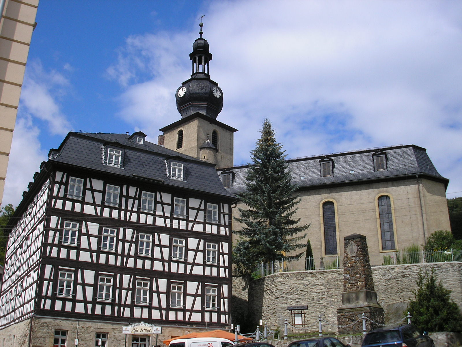 Die Stadtkirche und die alte Schule in Gräfenthal (Thüringen).